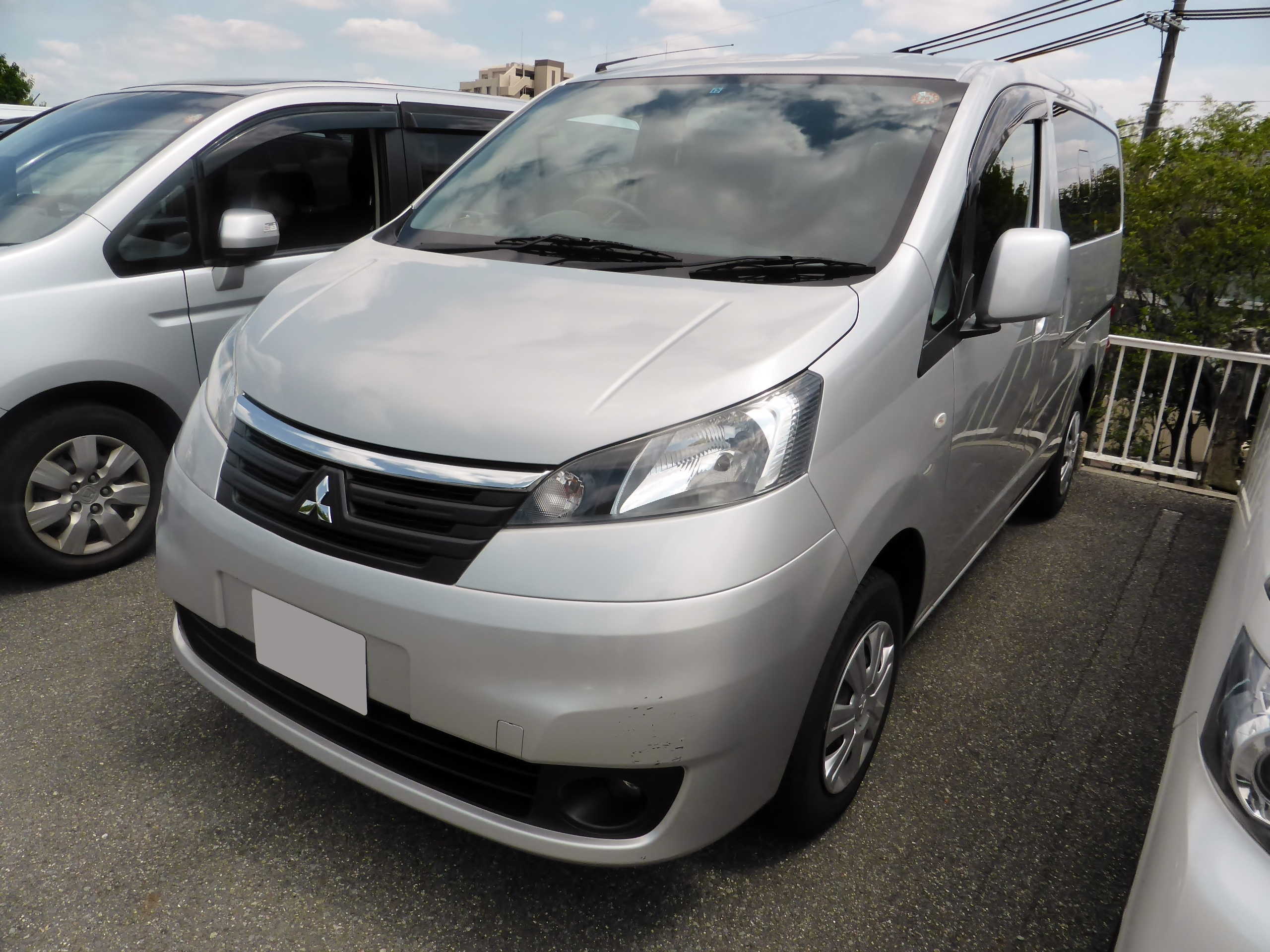 BM20型三菱・デリカD:3 Gをフロントから撮影。